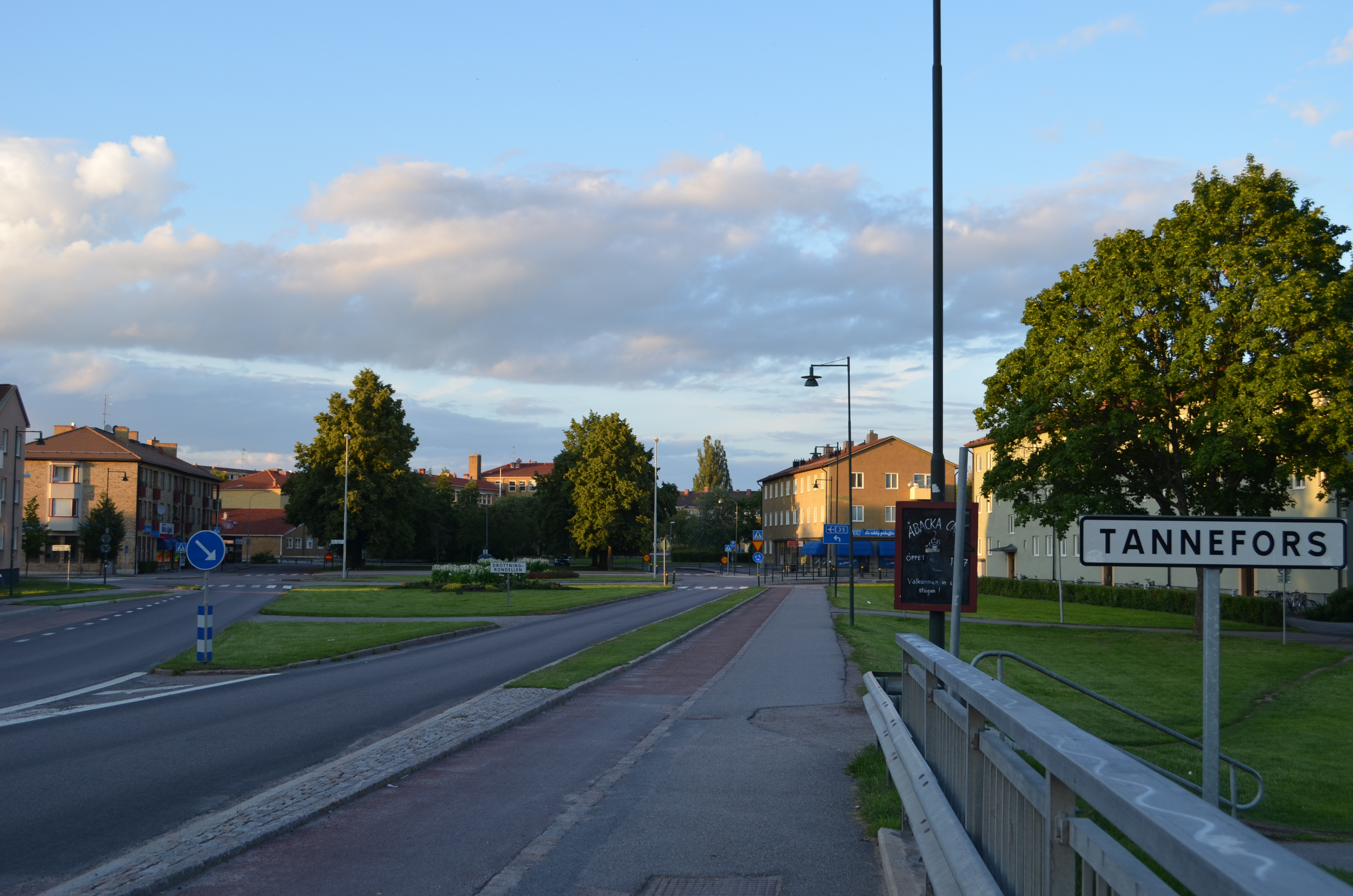 Tannefors fotograferat från Drottningbron, Linköping under Kruosio och Mannen av börds sightseeing i Linköping